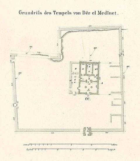 Grundriss des Tempels von Deir el-Medina, Ägypten